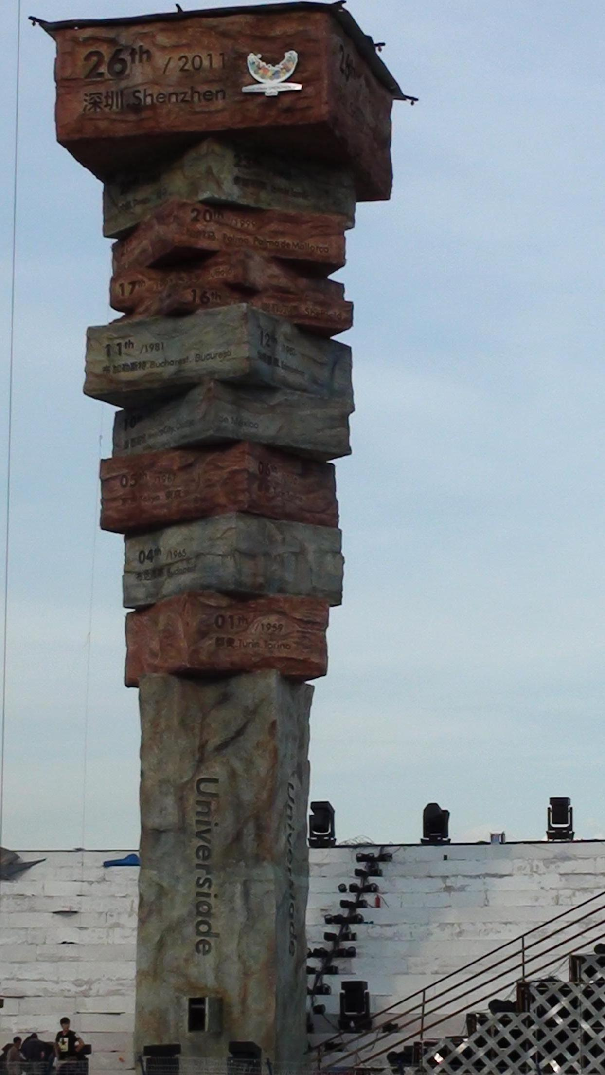 深圳大运会主火炬